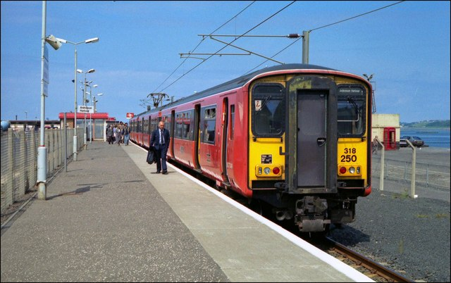 Ardrossan Harbour station